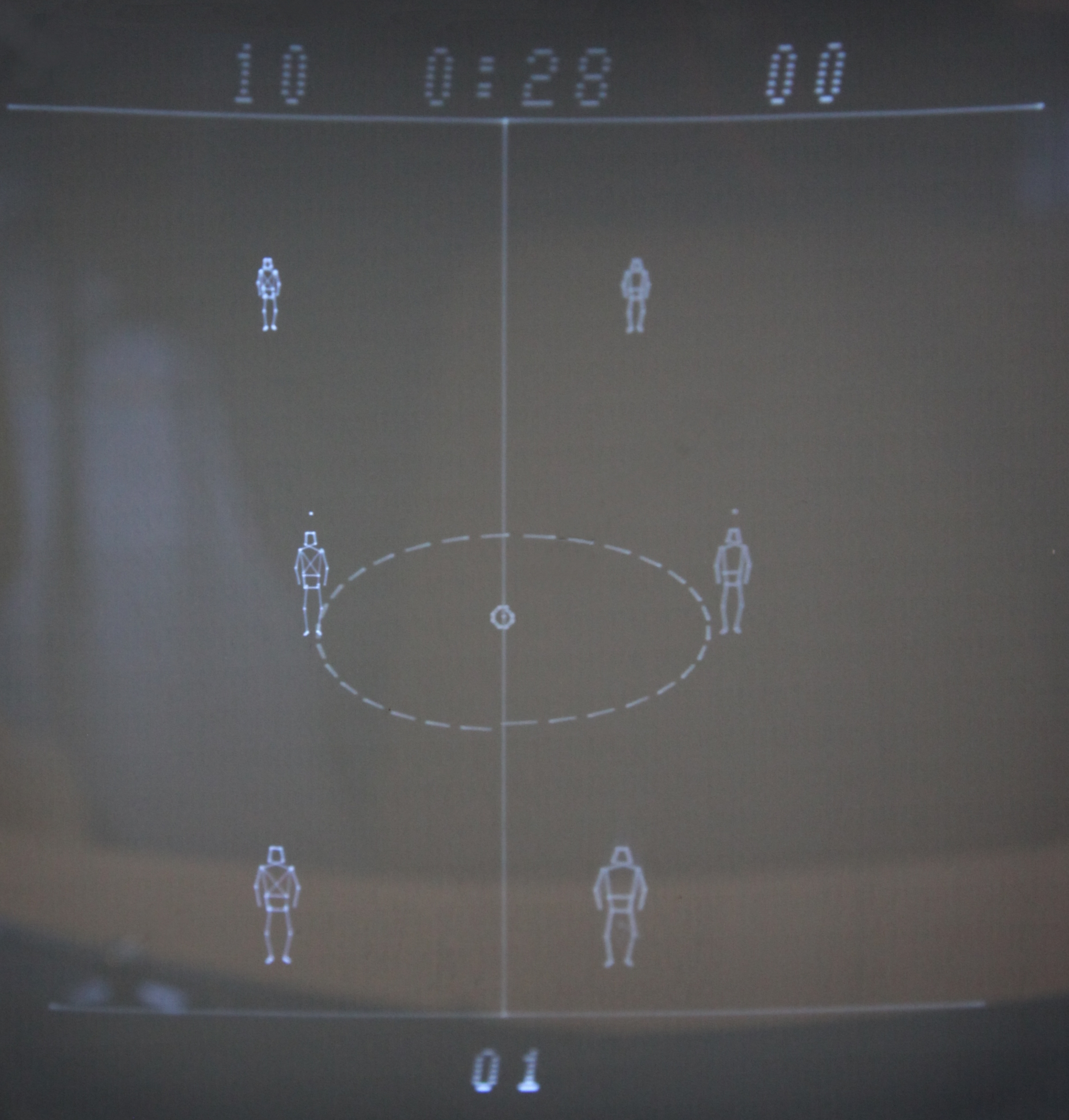 Bildschirm mit Vektorgrafik Vectrex Heads Up Action Soccer Game